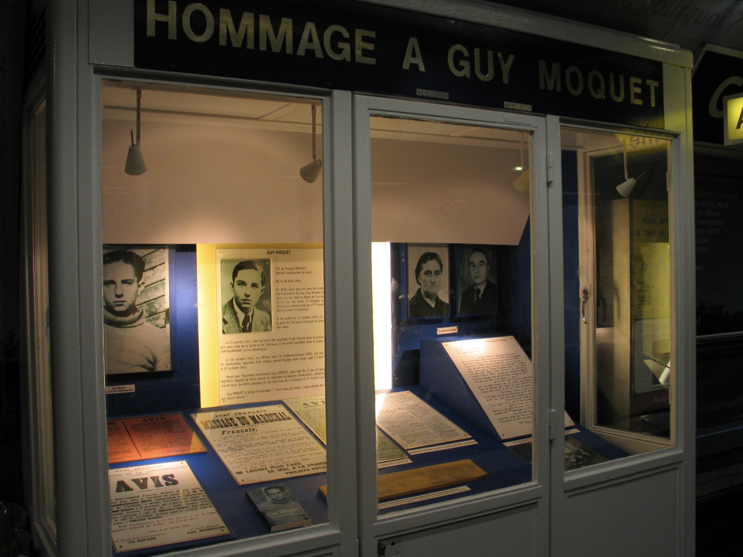 Exposition en hommage à Guy Môquet visible à la station RATP portant son nom. Métro de Paris, ligne 13, 17e arrondissement. Carrefour de l'avenue de Saint-Ouen et de la rue Guy Môquet.